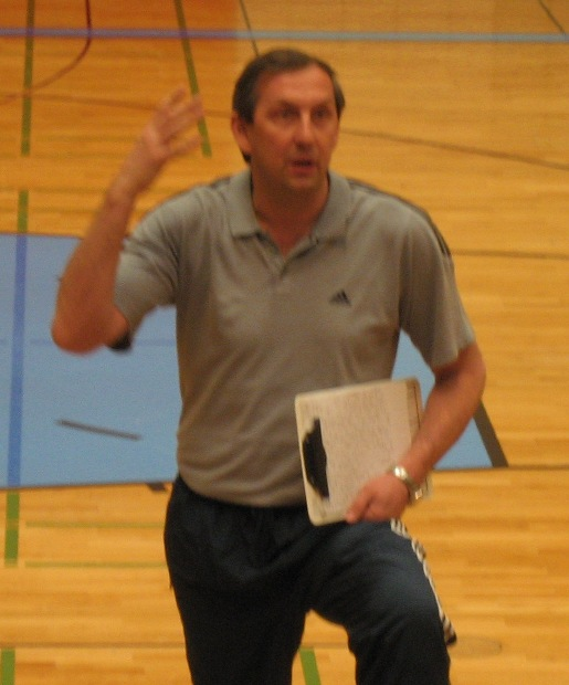 Emir Mutapcic wÃ¤hrend einer Trainerfortbildung in Bamberg